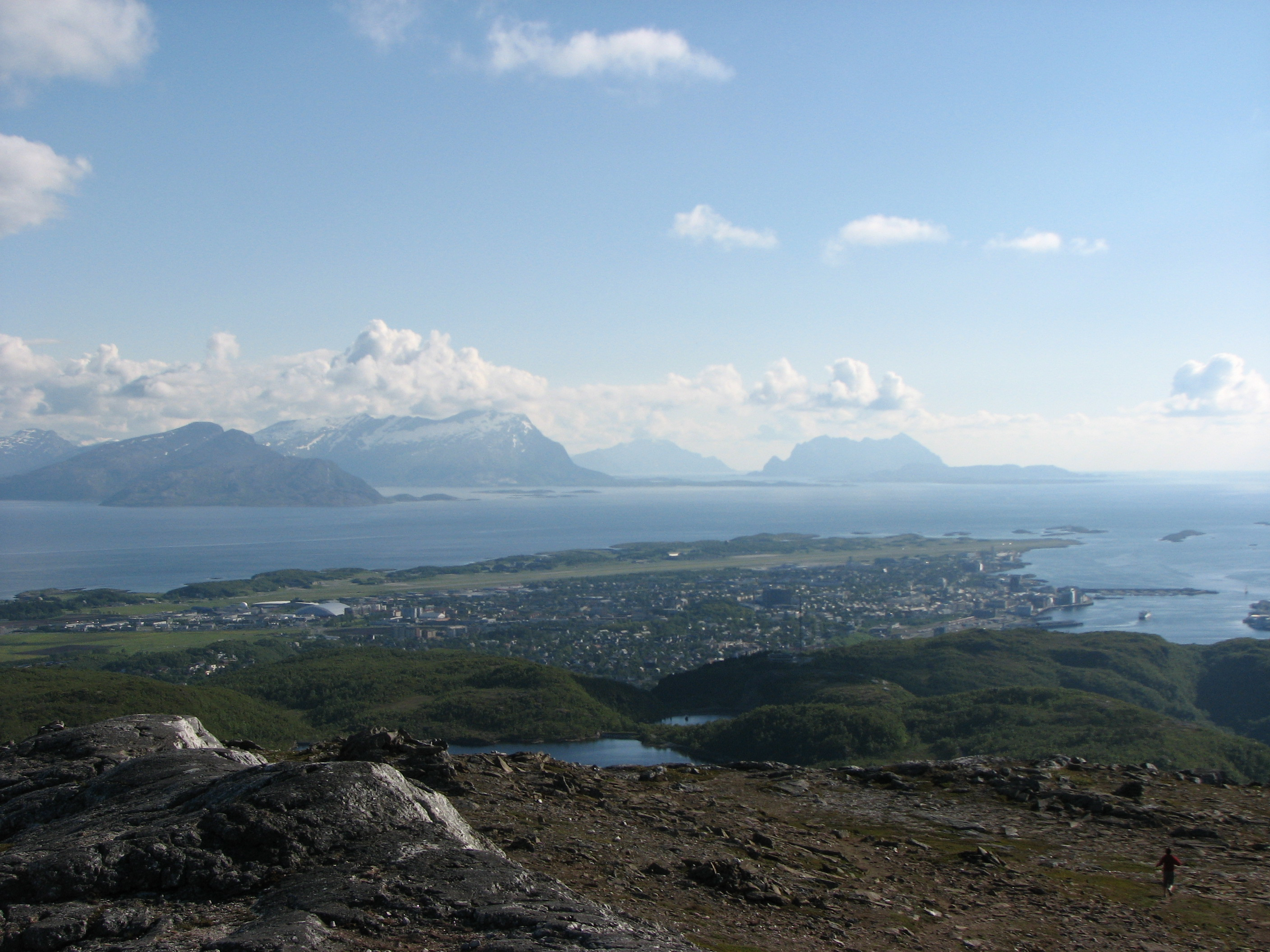 Utsikt over Bodøhalvøya fra Keiservarden